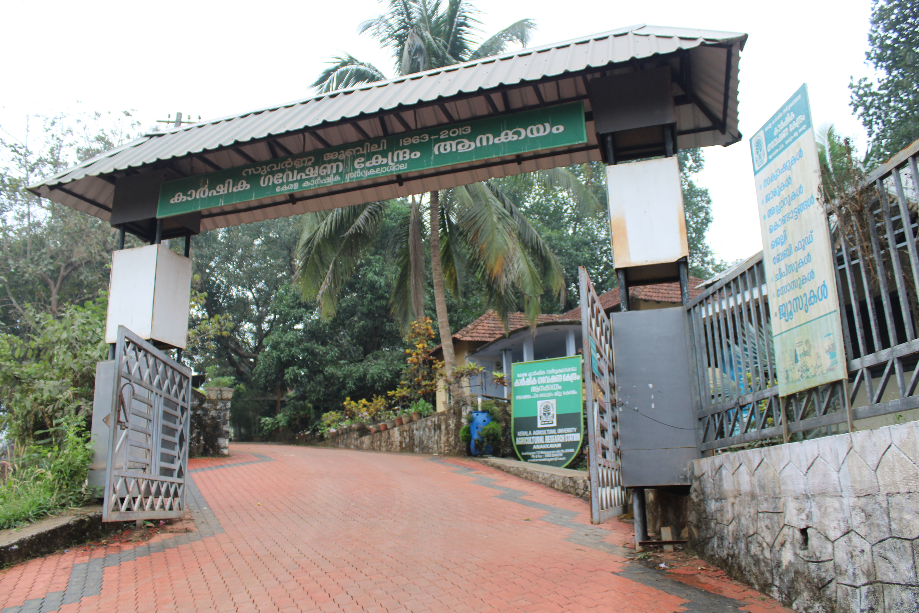 സുവർണജൂബിലിയോടനുബന്ധിച്ച് നിർമിച്ചത്